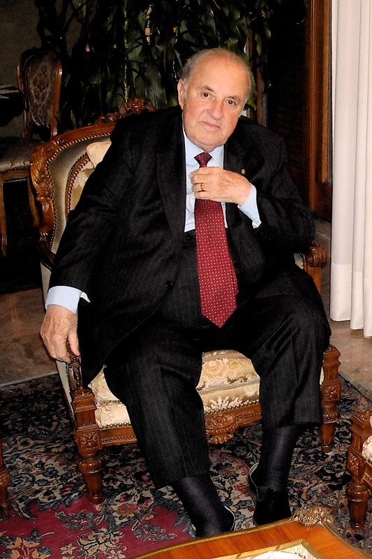 Il tenore Carlo Bergonzi (1924 - 2014) fotografato nella sua casa di Milano